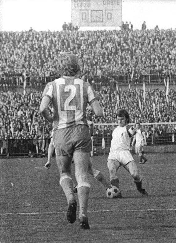 ADN-ZB-Koch-3.4.74-Gü-Leipzig: Fußball-Oberliga - Chemie Leipzig - FC Rot-Weiß Erfurt 0:1 - Im ausverkauften Stadion verlor Chemie Leipzig das entscheidende Spiel um den Klassenerhalt. Rechts: Jürgen Schubert (Chemie Leipzig), Spieler Nr. 2: Franz Egel (Rot-Weiß Erfurt).